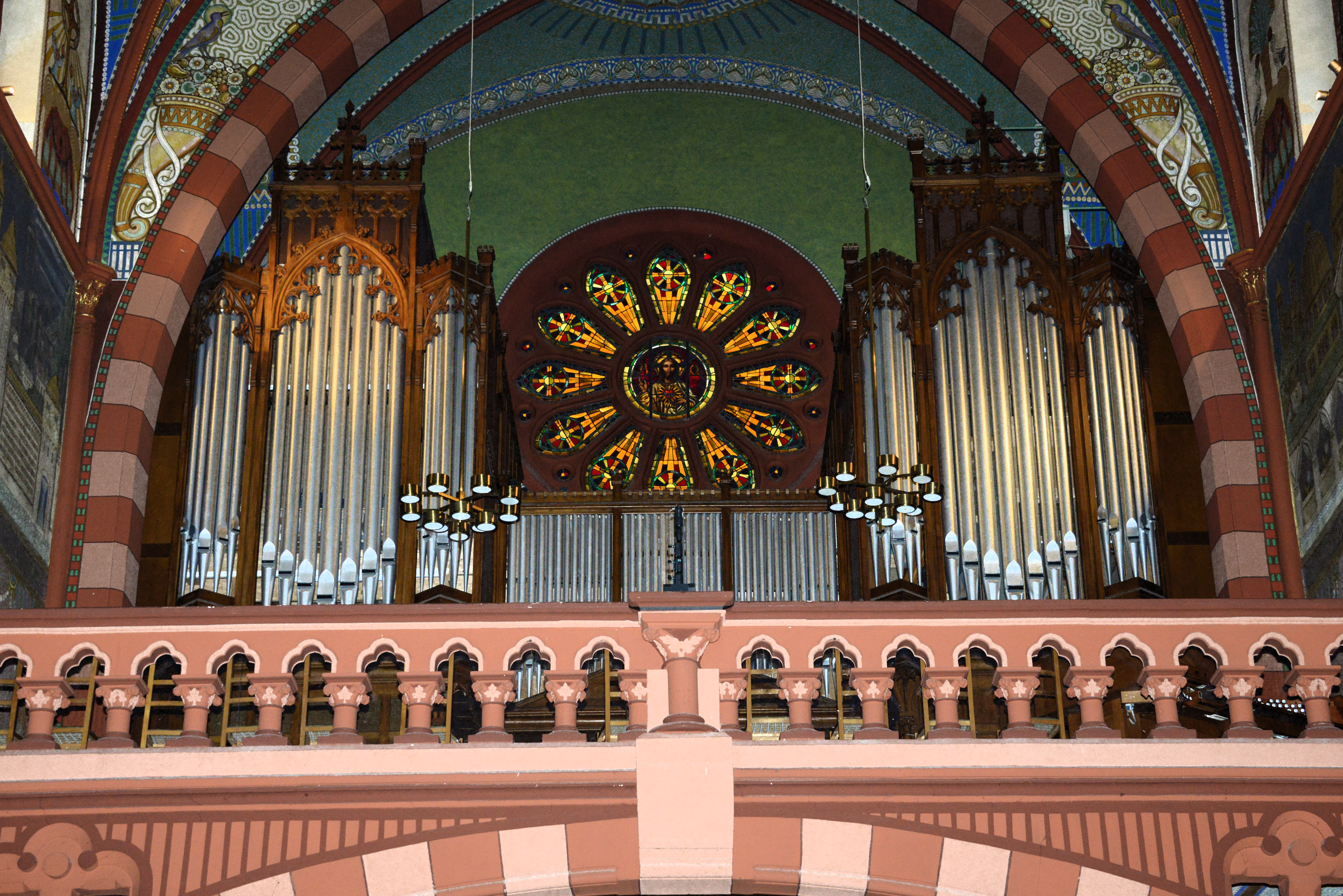 D'Uergel um Duxall vun der der Diddelenger Parkierch.